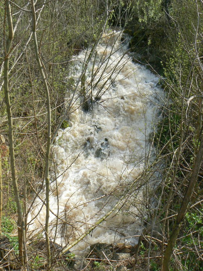 Vyvieračka v záhrade Svätého Andróda, extrémny stav. Tento výdatný výver (niekoľko hektolitrov za sekundu) je azda najrozkolísanejším krasovým prameňom Dolného vrchu. Spravidla býva aktívny len na jar alebo počas meteorologicko-hydrologických extrémov. Väčšinu roka je inaktívny - "spí". Drénuje dosiaľ neznámu jaskynnú sústavu, ktorá má minimálne parametre Vápennej alebo Hrušovskej jaskyne na Silickej planine.